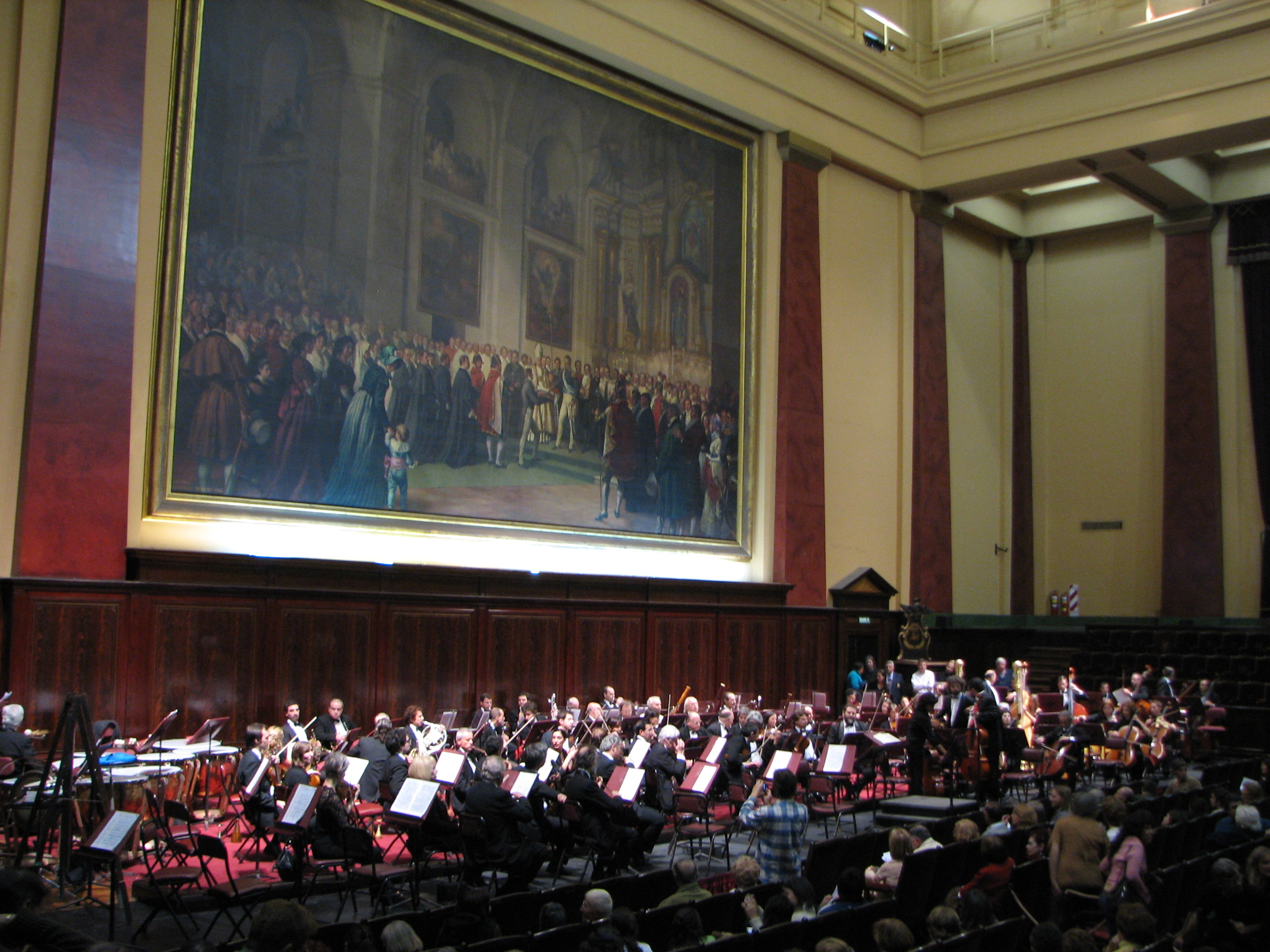 Orquesta Sinfónica Nacional Argentina minutos antes de ejecutar la 2ª sinfonía de Gustav Mahler el 2 de mayo de 2008 en el Salón de Actos del edificio de la Facultad de Derecho de la Universidad de Buenos Aires.